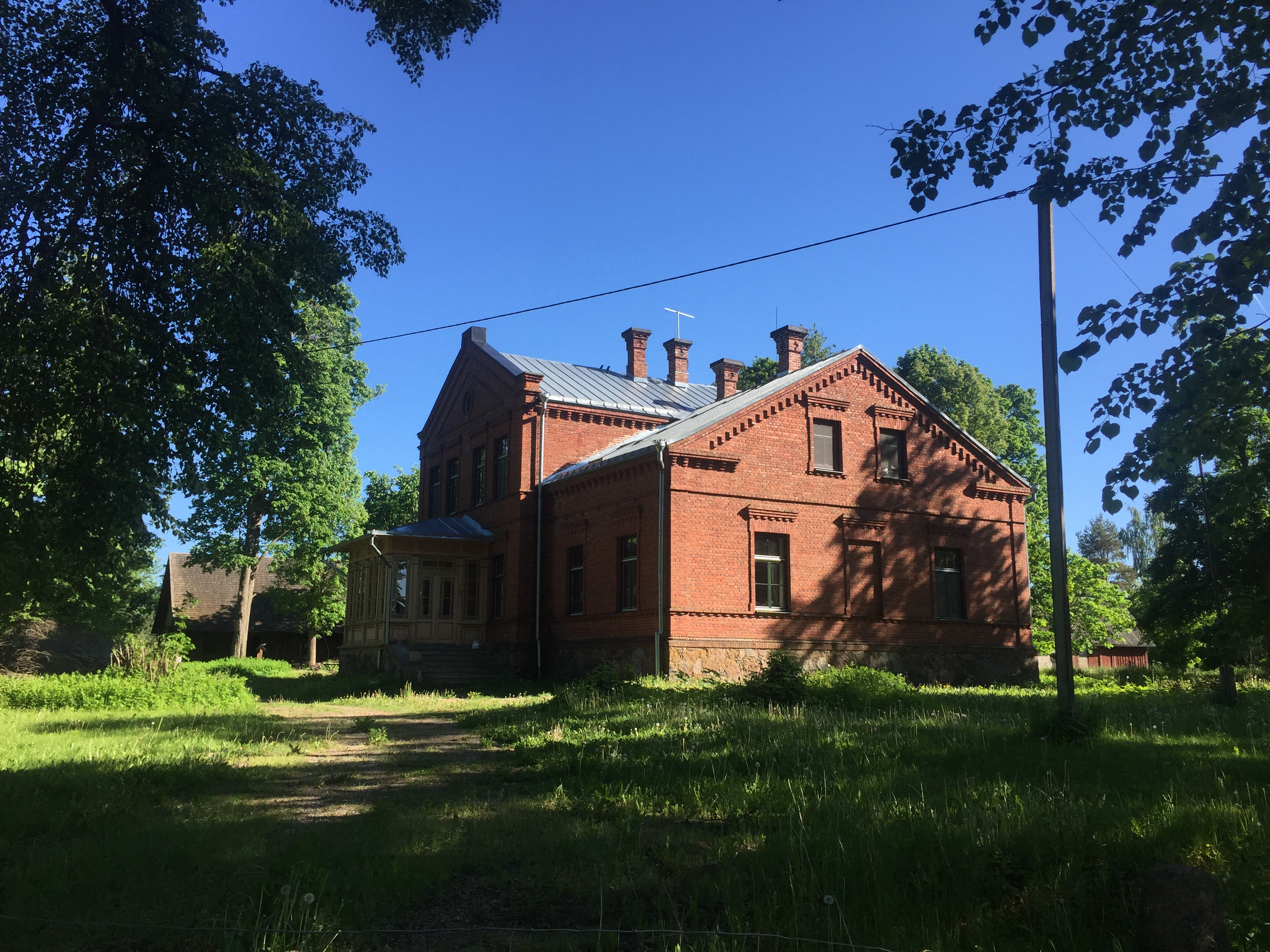 Issaku mõisa peahoone 2019. aasta juunis.